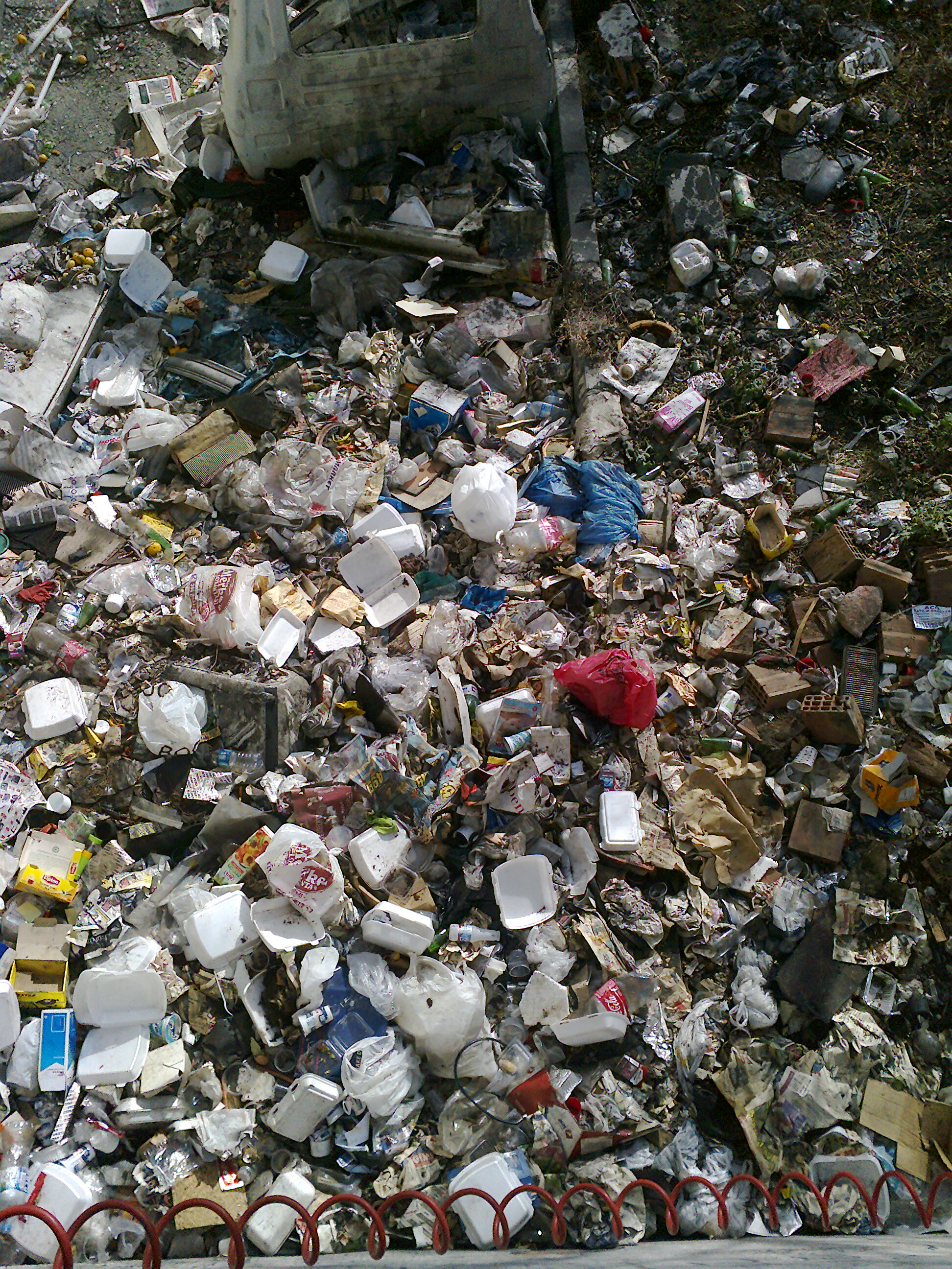 Çöp yığını